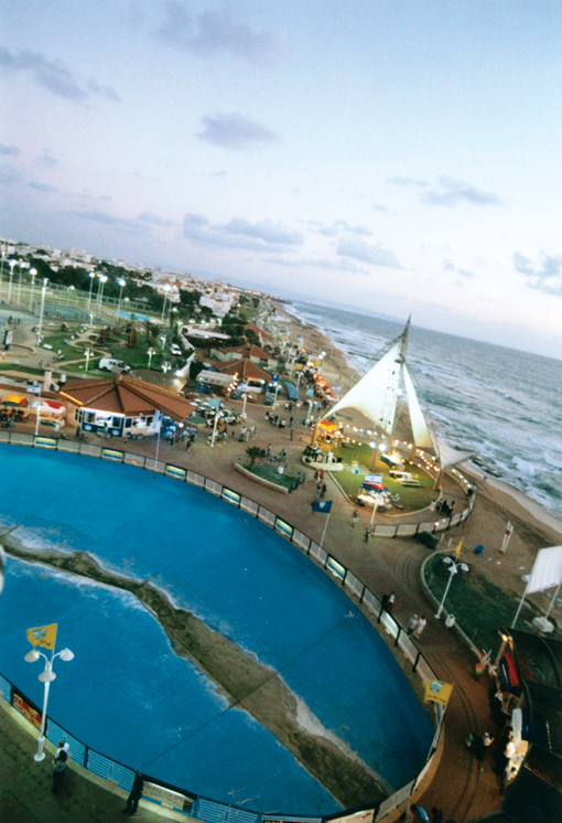 אישור- "מאשרת שימוש בתמונות שנמסרו על ידי העירייה, לאתר ויקפדיה. בכבוד רב, גליה מור מנהלת מח' תרבות עיריית נהריה"